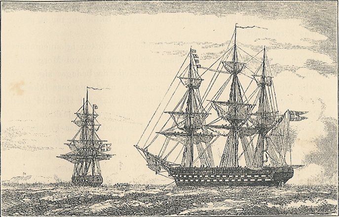 "Kristian den 8de" og "Gefion" i Eckernförde Fjord. 1849.